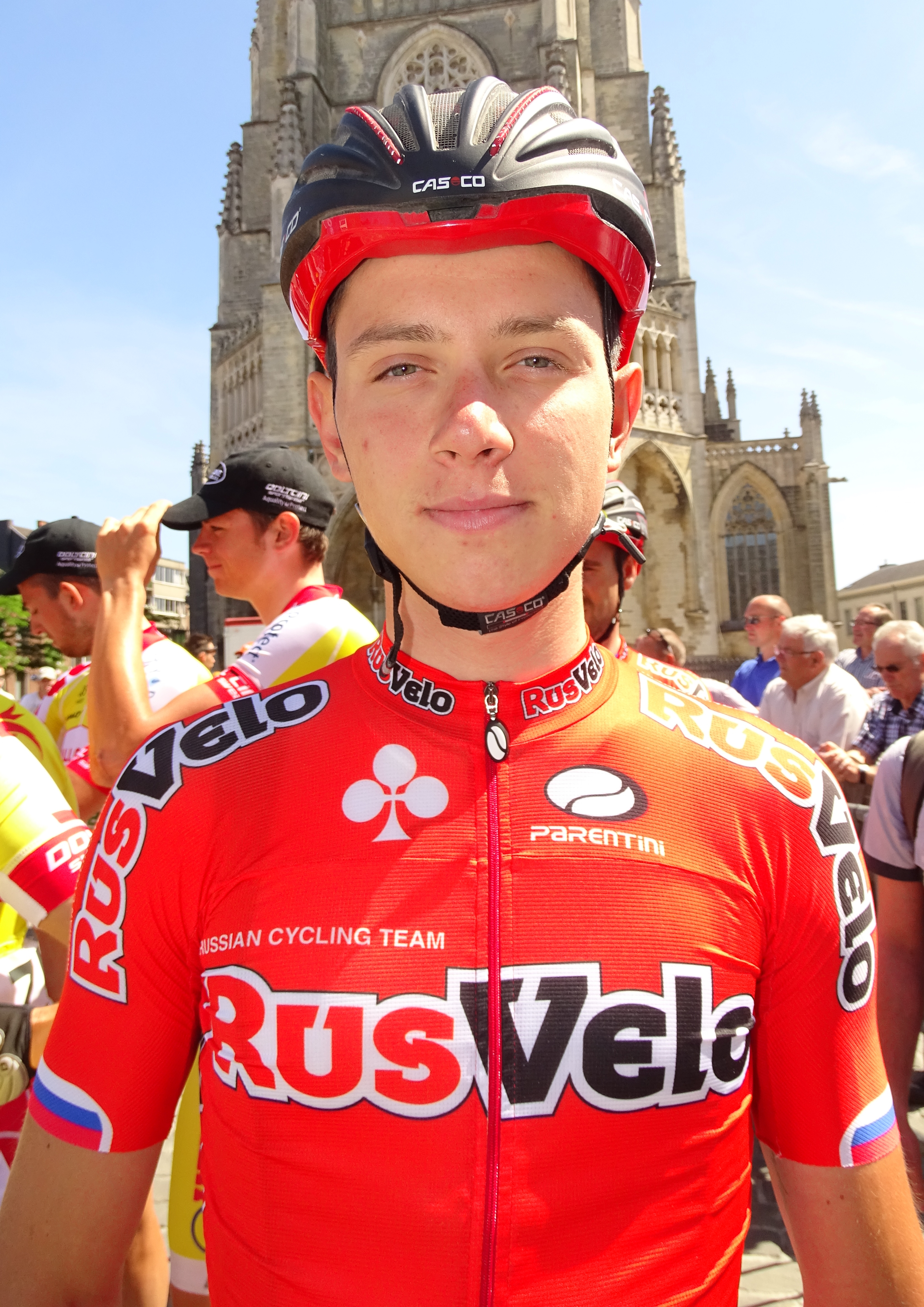 Reportage réalisé le dimanche 14 juin à l'occasion du départ et de l'arrivée du Tour du Limbourg 2015 à Tongres, Belgique.